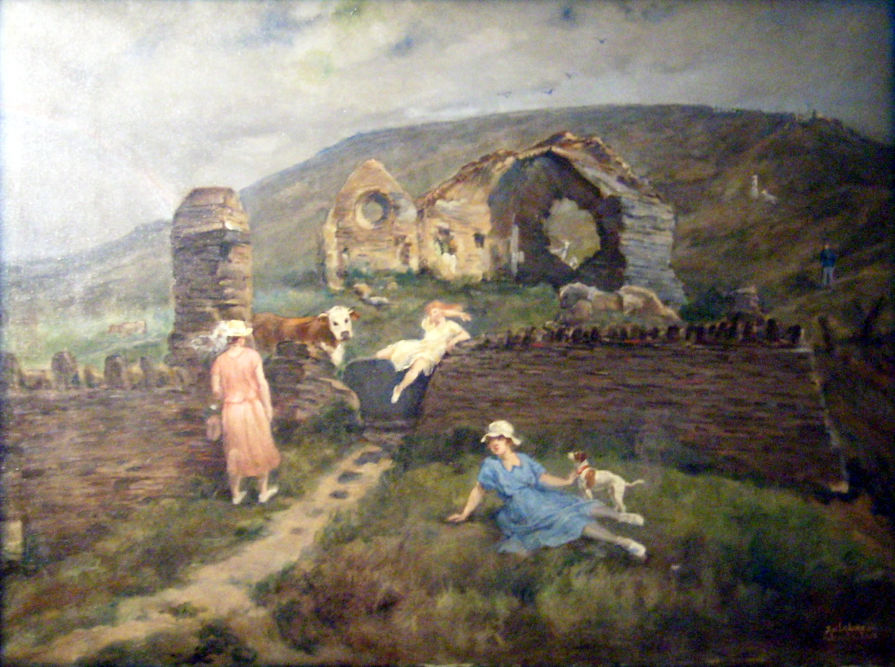 Adolphe Lalyre. Exposition au Musée Thomas-Henry, Cherbourg-Octeville, Carteret, jeunes femmes à la Vieille Eglise Saint-Germain Prêt de la mairie de Barneville-Carteret